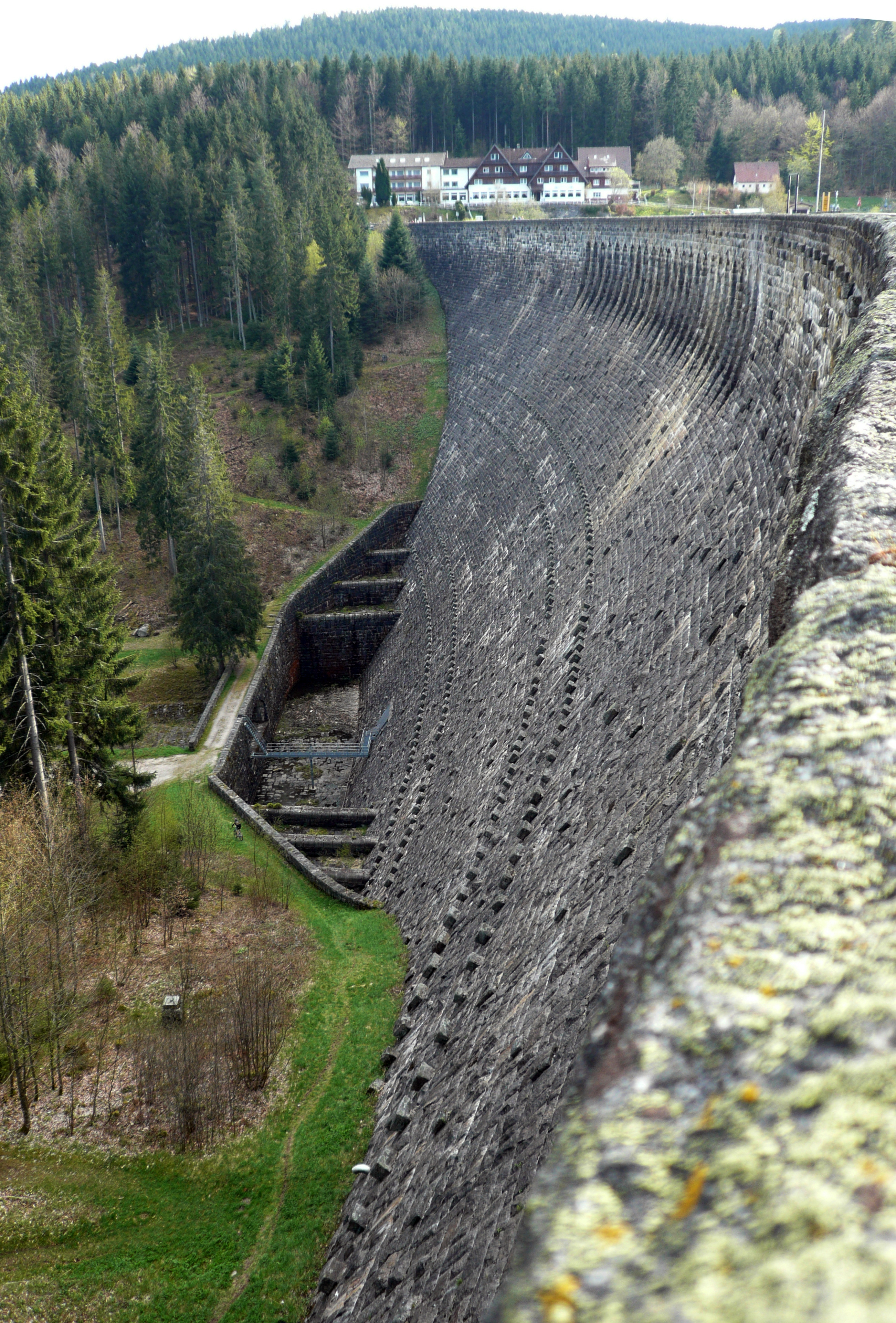 Schwarzenbachtalsperre in Black Forest